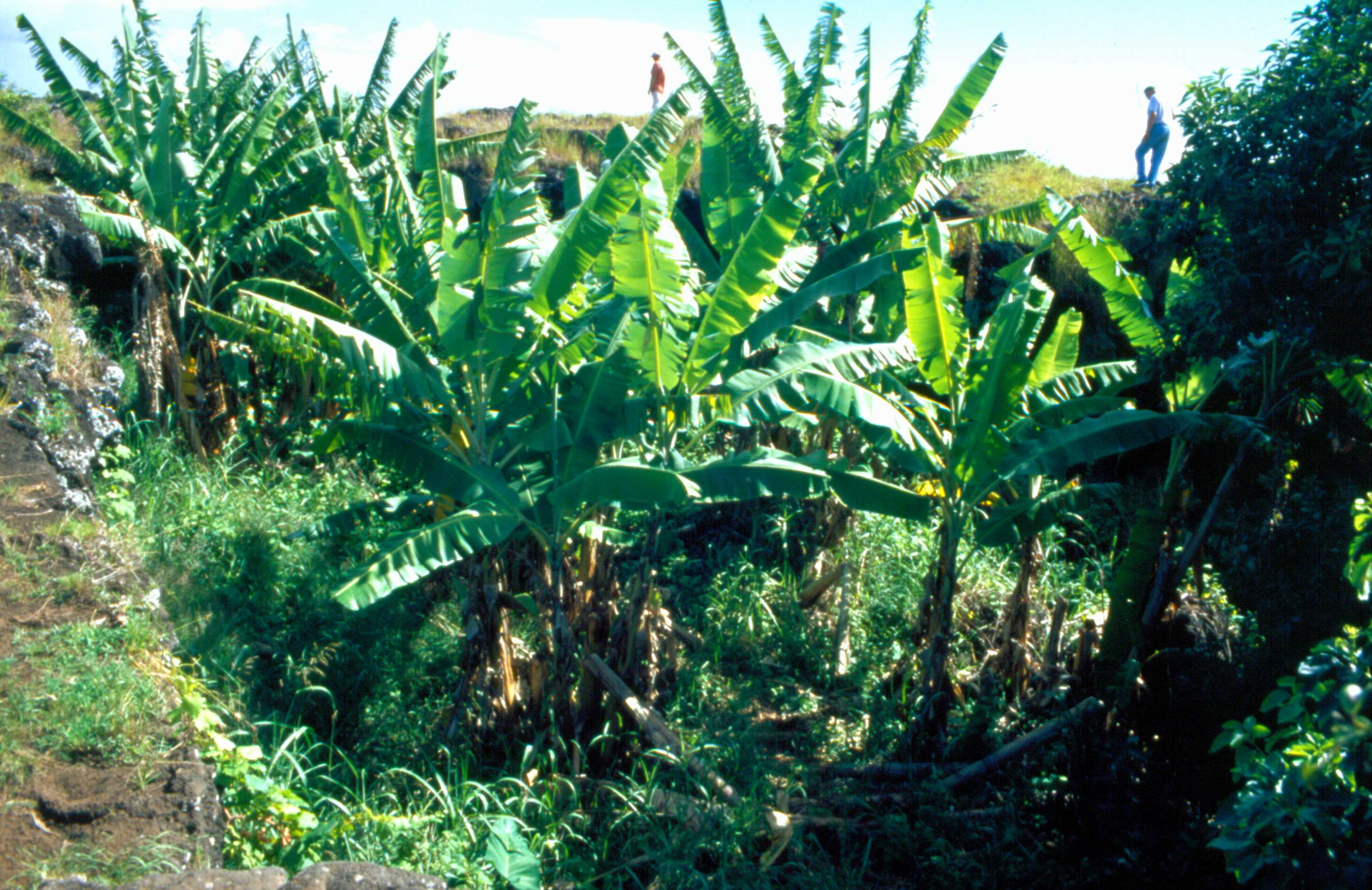 In einer eingesunkenen Magmablase angelegtes Tiefbeet auf der Osterinsel